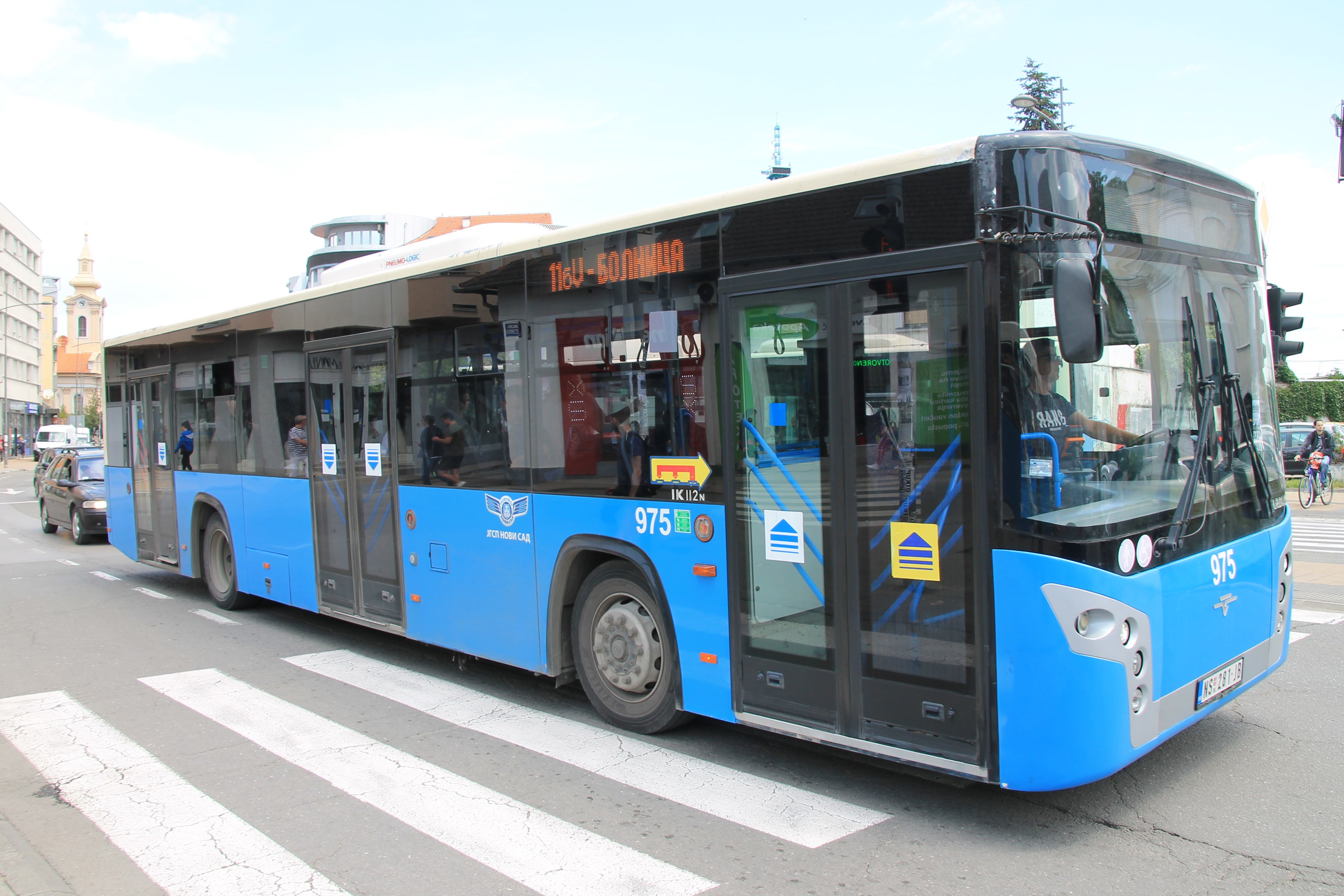 Transport in Novi Sad